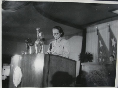 台湾民主自治同盟代表谢雪红在全国政协第一届全体会议上发言